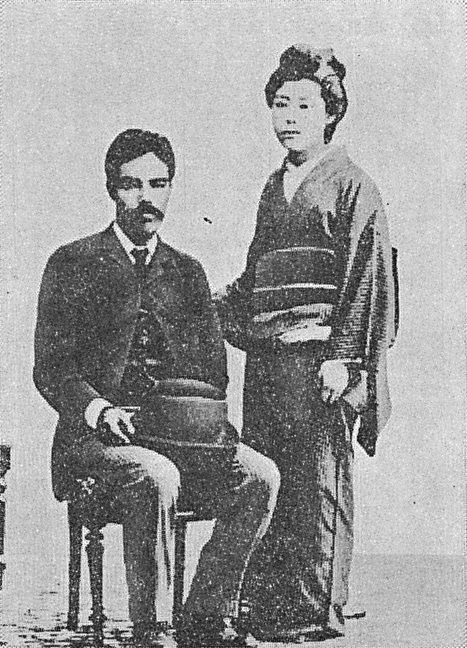 熊本での教員時代に新妻シズと撮影した写真